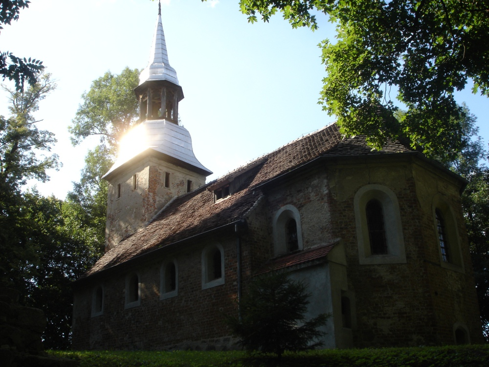 Kościół w Koszewku, gmina Stargard Szczeciński, powiat stargardzki